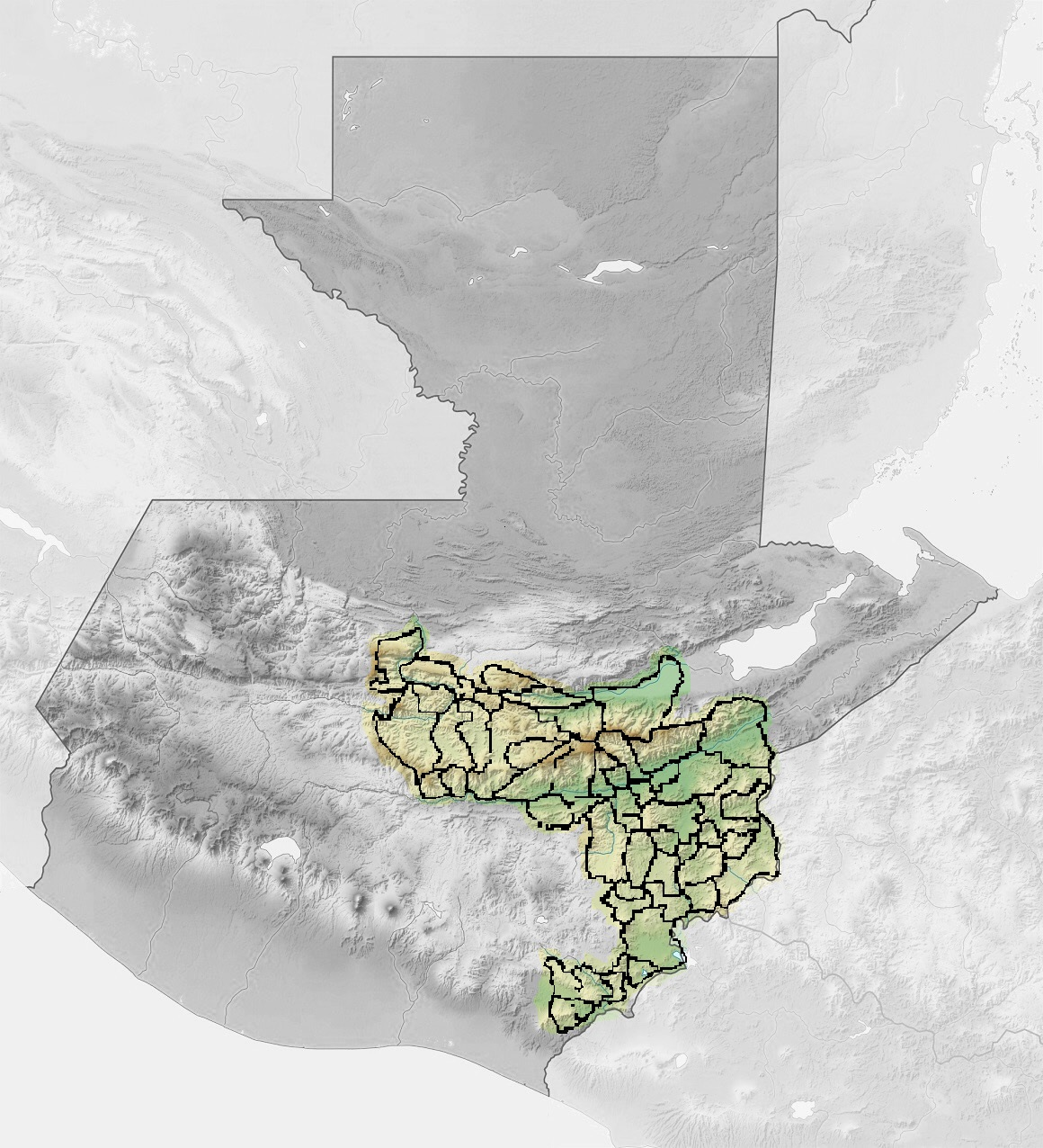 Corredor seco de Guatemala